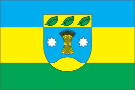 Прапор Березнегуватського району